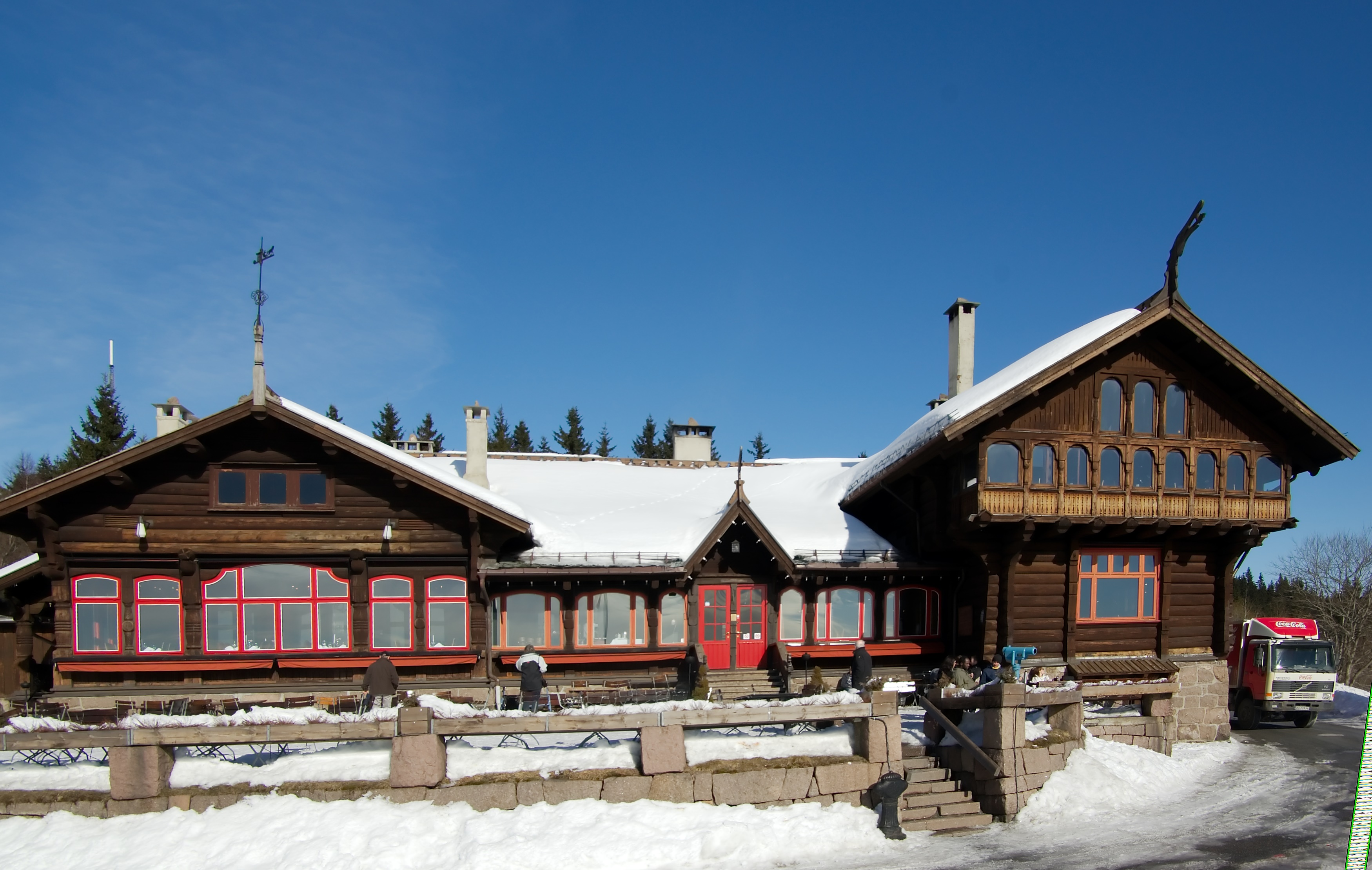 Frognersæteren restaurant